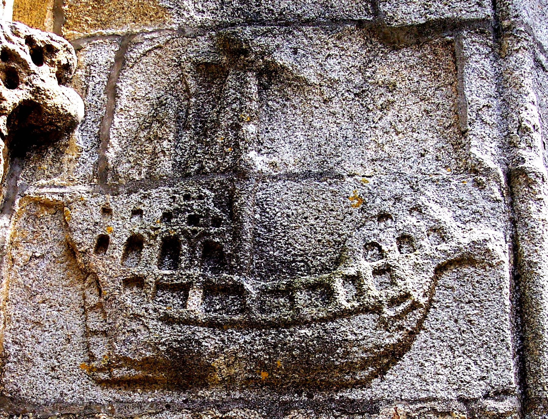 Une caravelle en bas-relief sur le pilier droit du porche de l'église Saint-Nonna - 22/05/2006 - photo Henri Camus